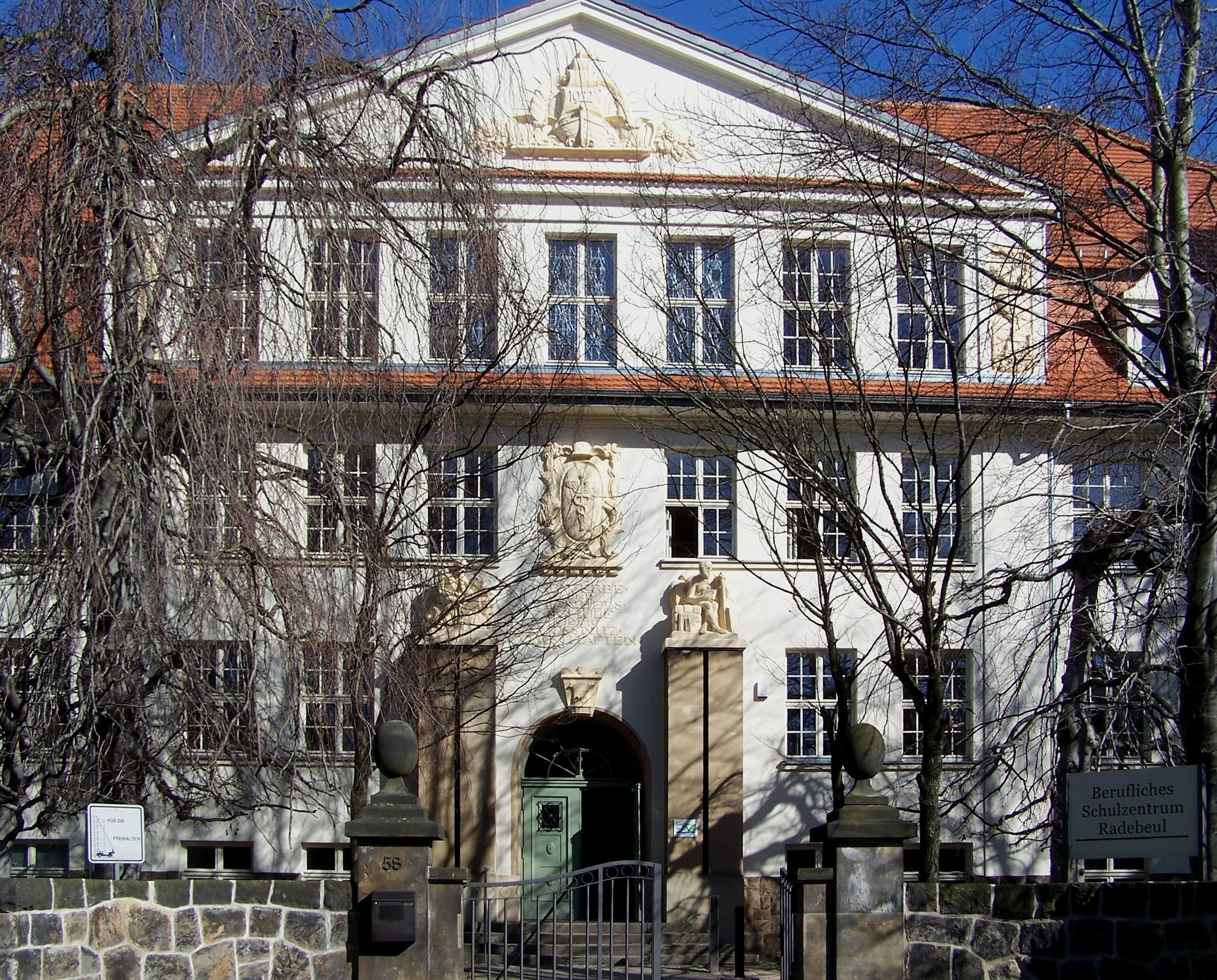 Berufsschulzentrum Radebeul, Straße des Friedens 58